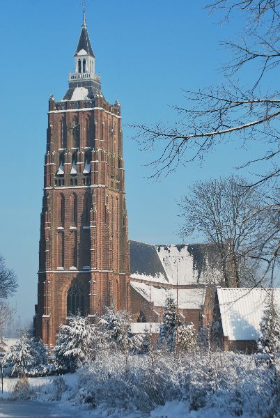 Deze foto is gemaakt op 28 december 2010